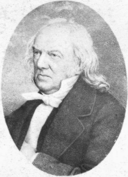 Porträtfotografie von Georg Friedrich von Jäger.